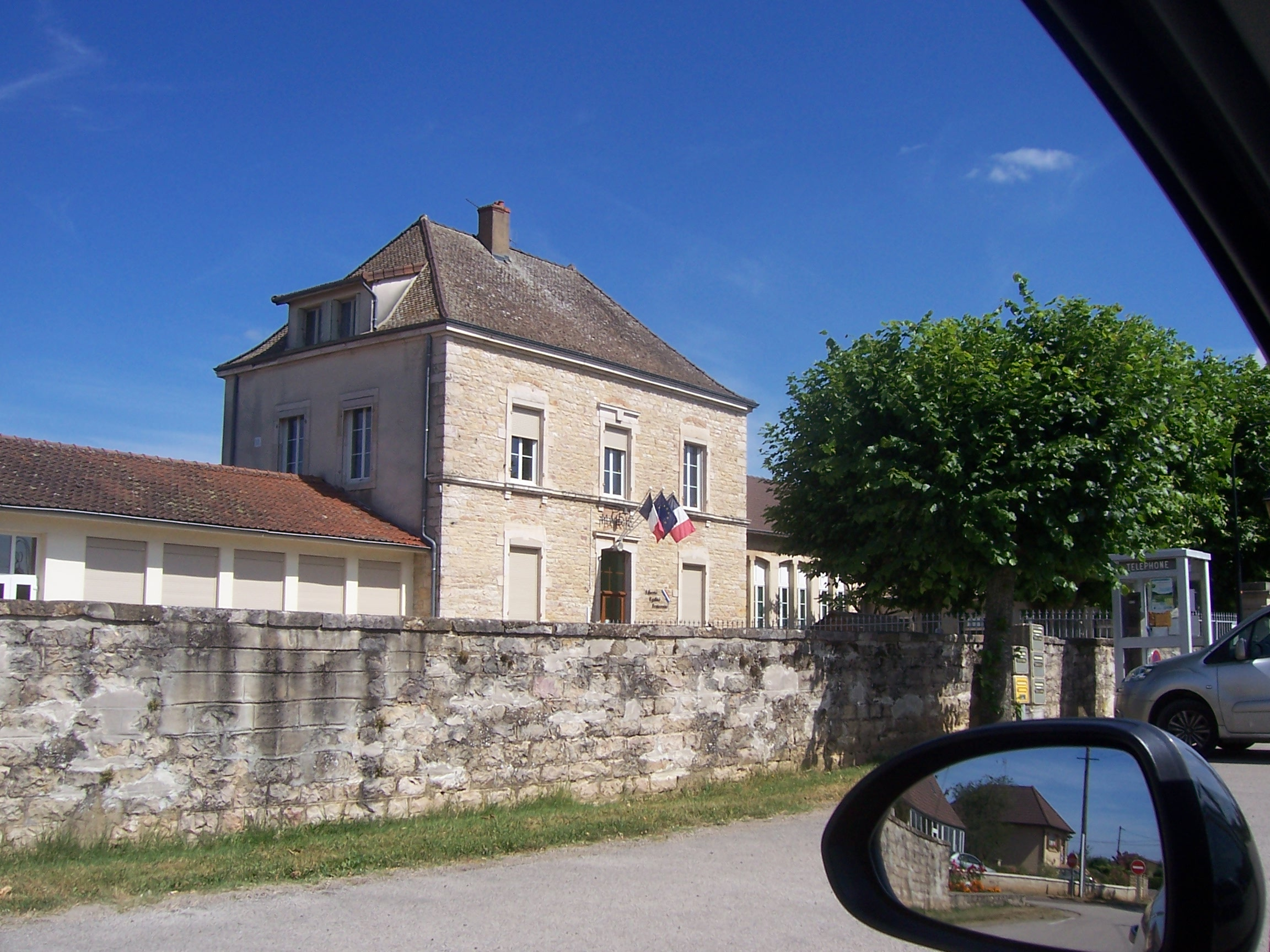 Mairie de Marnay